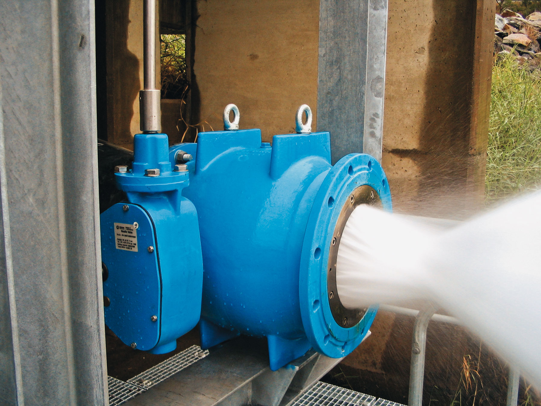 ERHARD_Ringkolbenventil_Anwendung